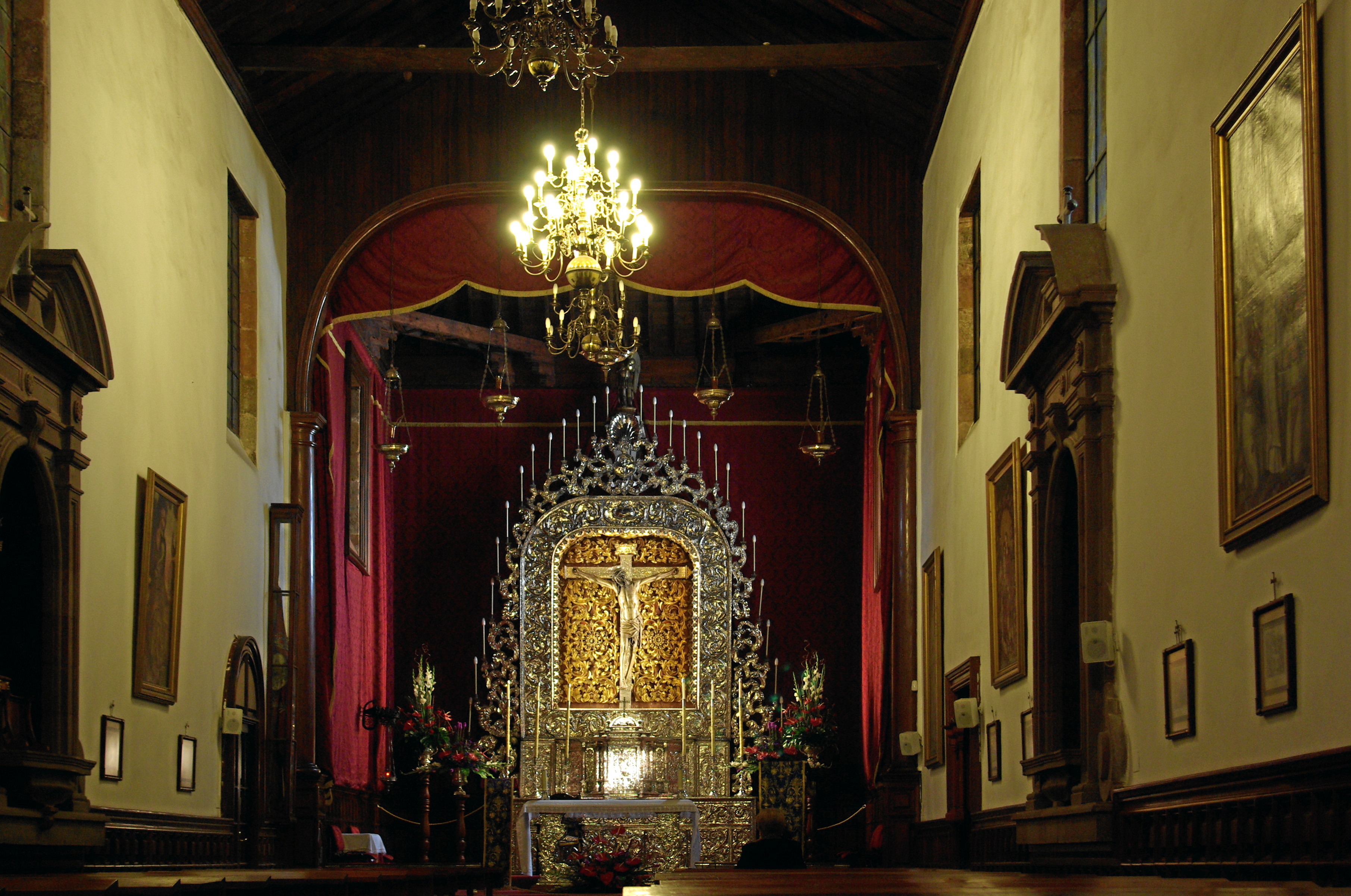 Teneriffa, La Laguna, Real Santuario del Santísimo Cristo de la Laguna, innen